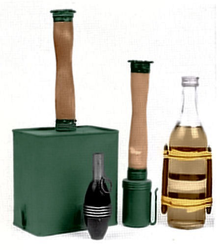 Talvisodan aikaista puolustuskalustoa vasemmalta: kasapanos, munakäsikranaatti, varsikäsikranaatti ja polttopullo.